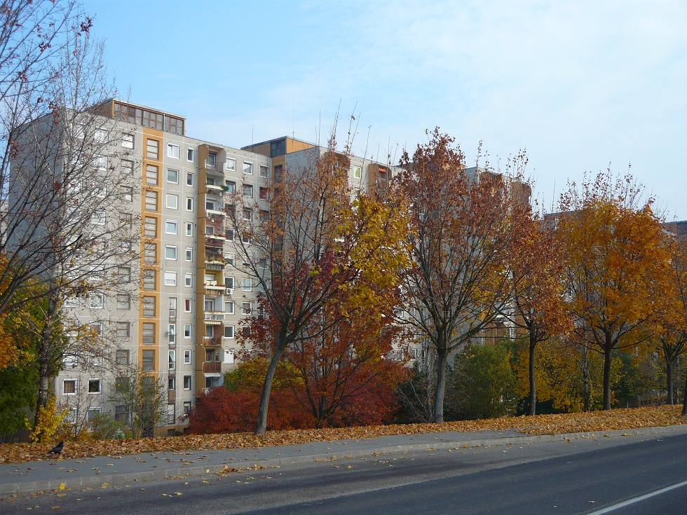 Gazdagrét, Budapest, District XI